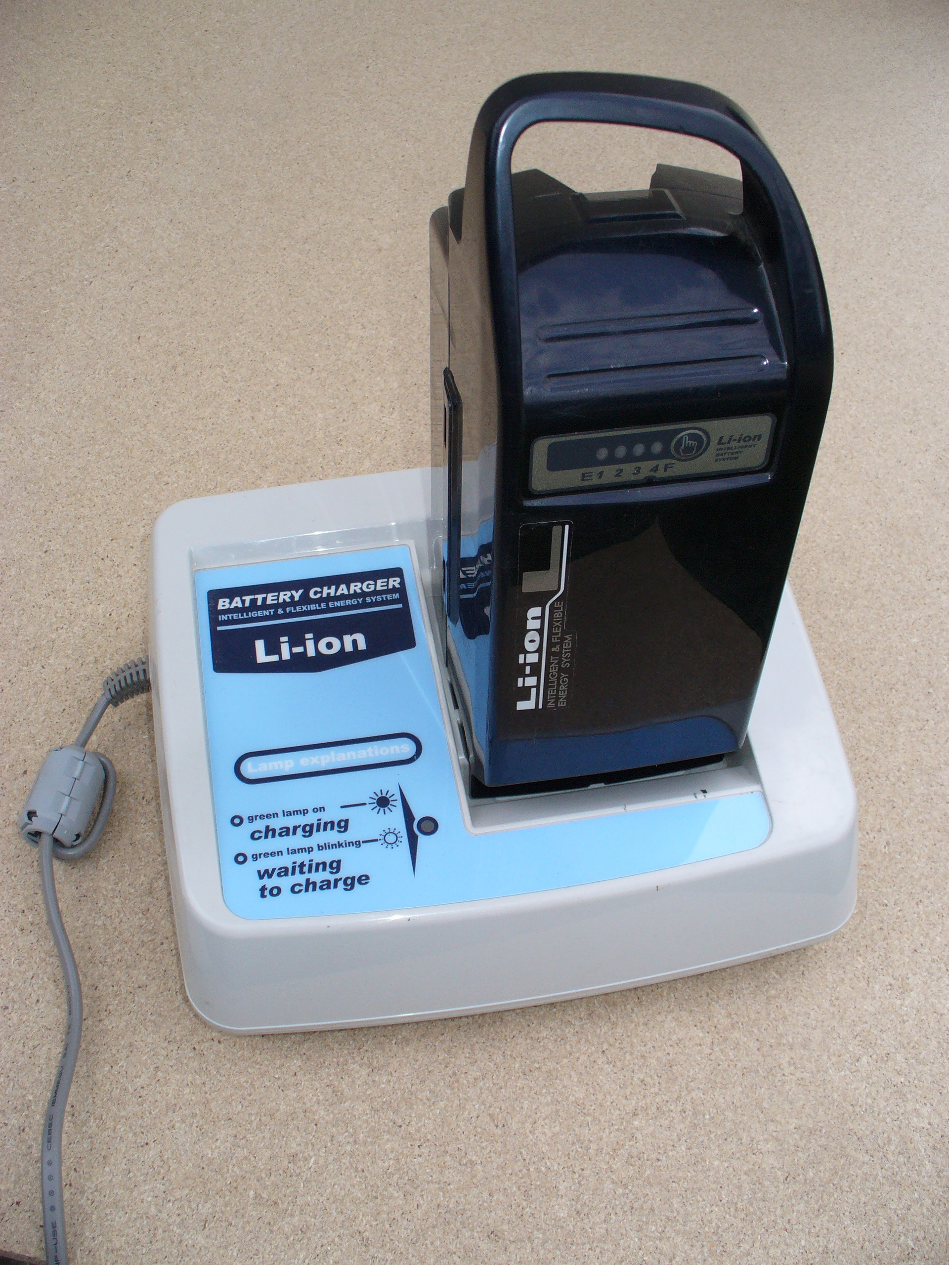 Lithium-Ionen-Akkumulator-Ladegerät mit Yamaha X60-E0 Traktionsbatterie (für Pedelec mit Yamaha-Mittelmotor, beispielsweise vom ungarischen Fahrradhersteller Gepida)